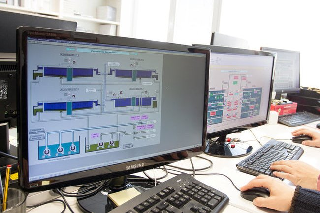 Manejo de un sistema de control y automatización